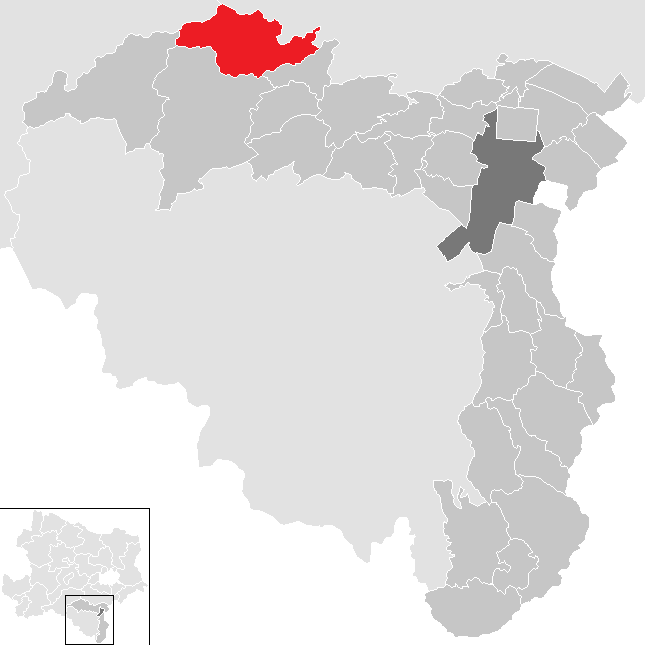 Bezirk Wiener Neustadt-Land